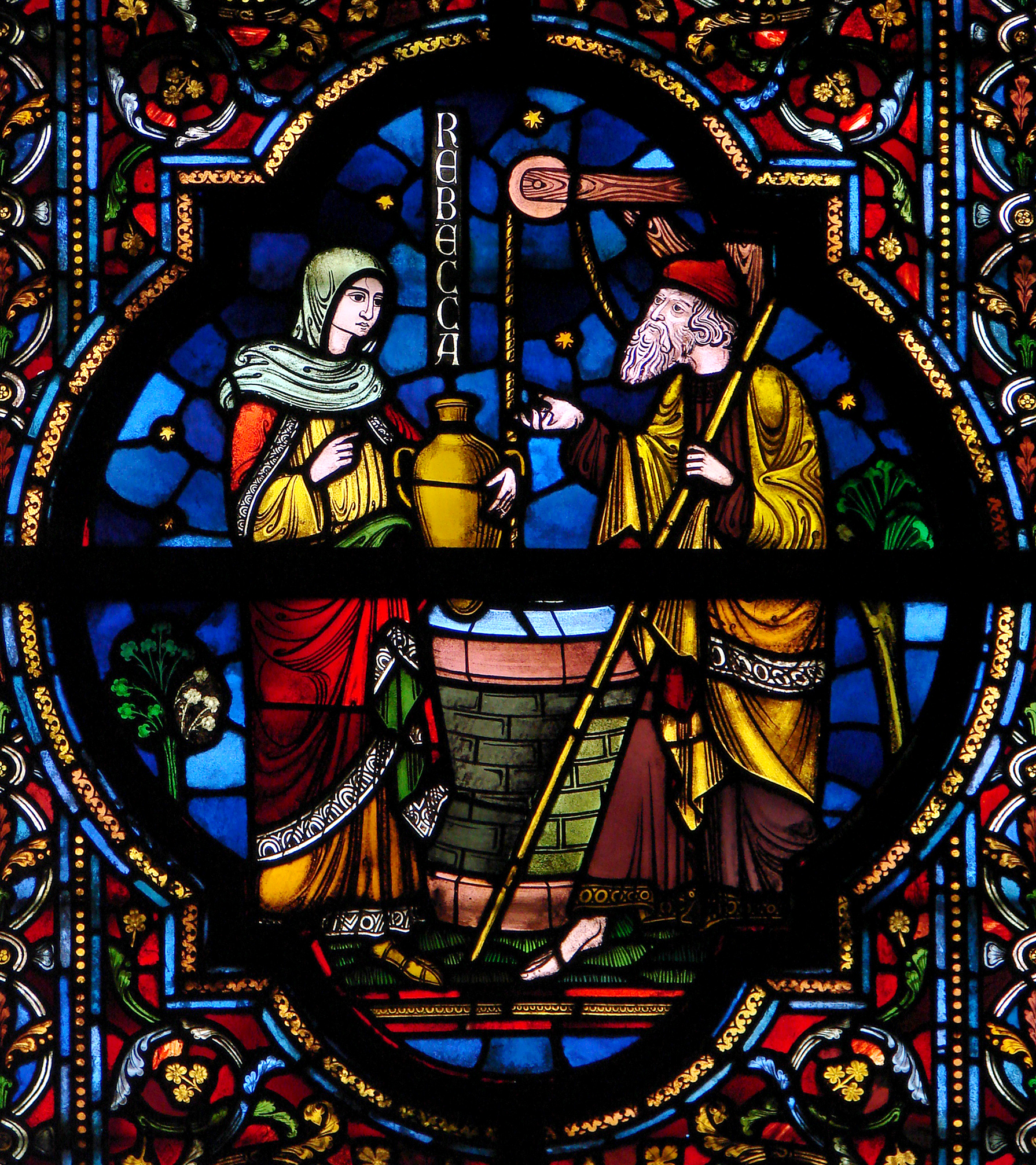 Vitrail de la collégiale Notre-Dame de Dinant : Rebecca.